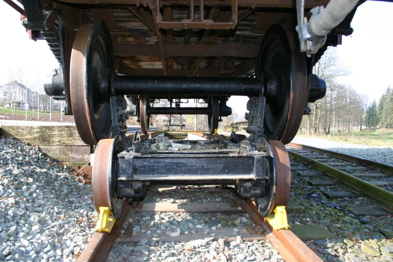 Detail der Rollbockumsetzanlage der Rollbockbahn in Oberheinsdorf